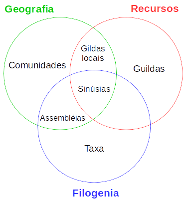 Este diagrama é uma adpatação do diagrama apresentado por Fauth et al. 1996 (Simplifying the Jargon of Community Ecology: A Conceptual Approach) apresentando a terminologia e a interseção dos conceitos em ecologia de comunidades.